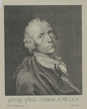 Georg Wilhelm Baurenfeind, Stecher, Selbstbildnis um 1751/1763, Kupferstich 208 x 168 mm (Blatt);) Nürnberg, Germanisches Nationalmuseum, Graphische Sammlung (Paul Wolfgang Merkel'sche Familienstiftung), Inventar-Nr. MP 1657, Kapsel-Nr. 24 (Nachstich von: Matthes, Nikolaus Christopher)